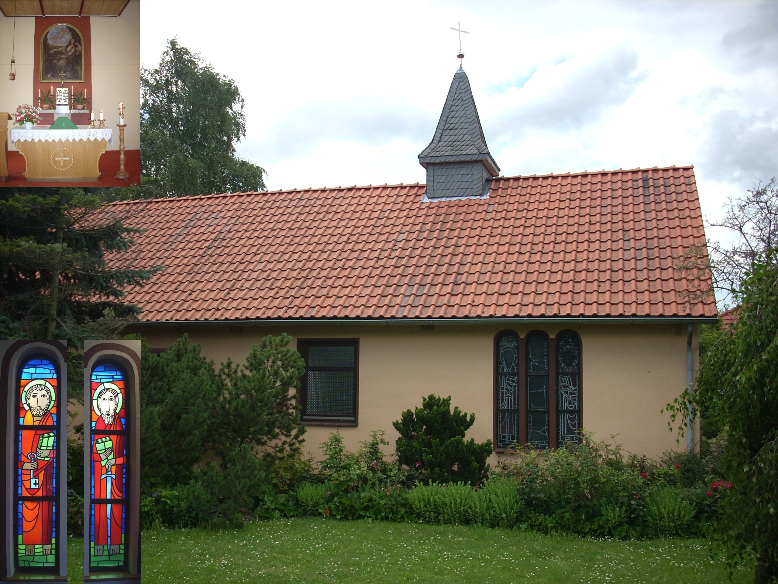 Kath. Kapelle St. Magdalenen, Evern, Sehnde (Germany); am 12. September 2010 profaniert